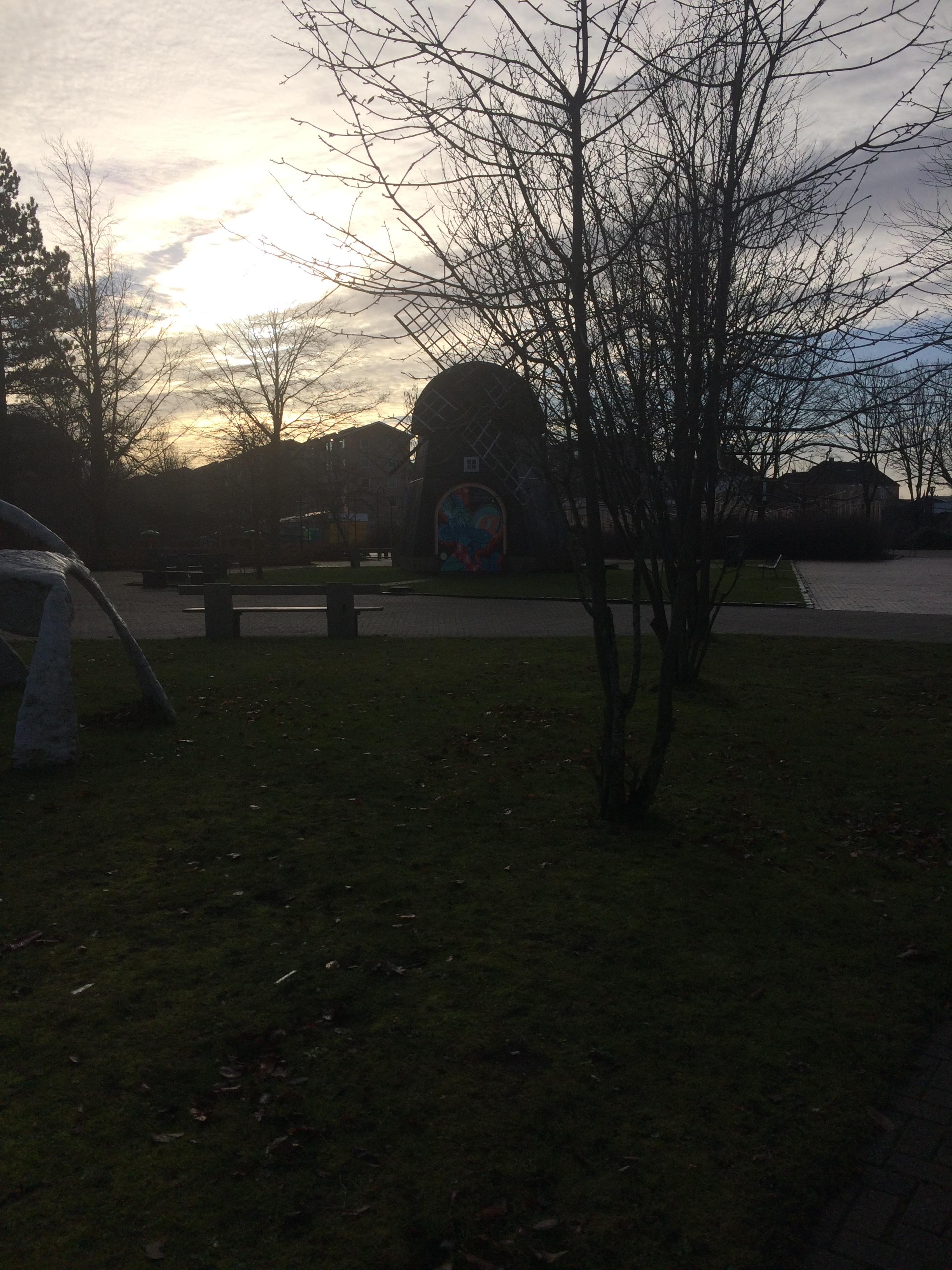 Møllen i Karolinelund